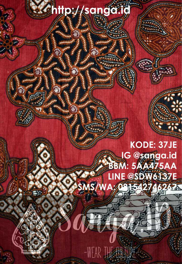 Salah satu detail batik sekar jagad